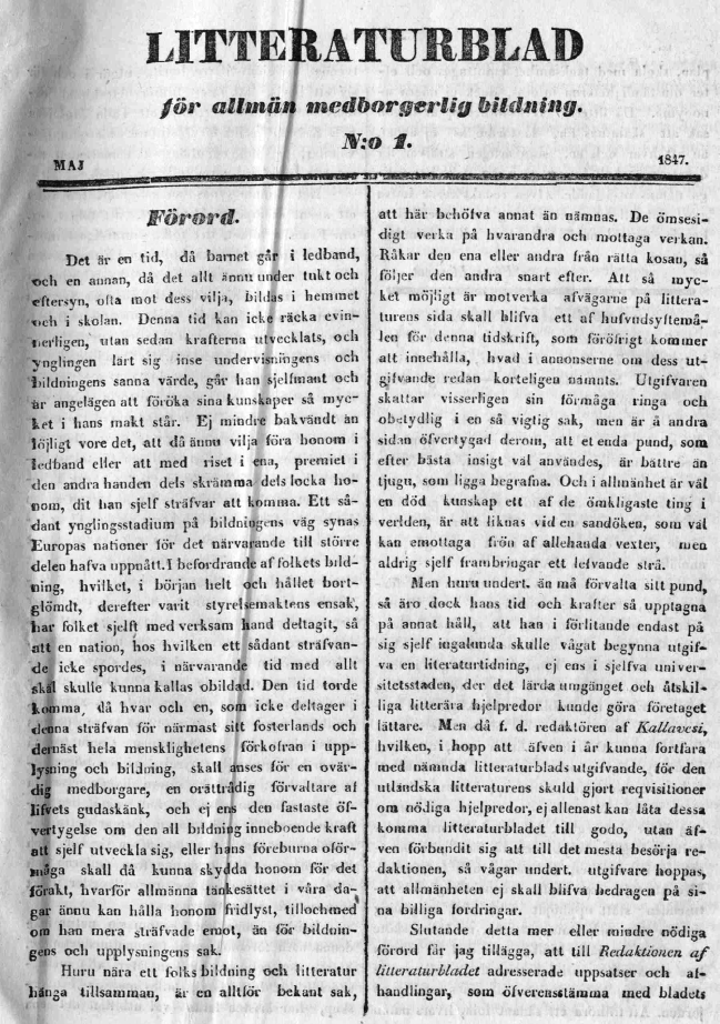 Litteraturblad för allmän medborgerlig bildning -lehden ensimmäisen numeron etusivu